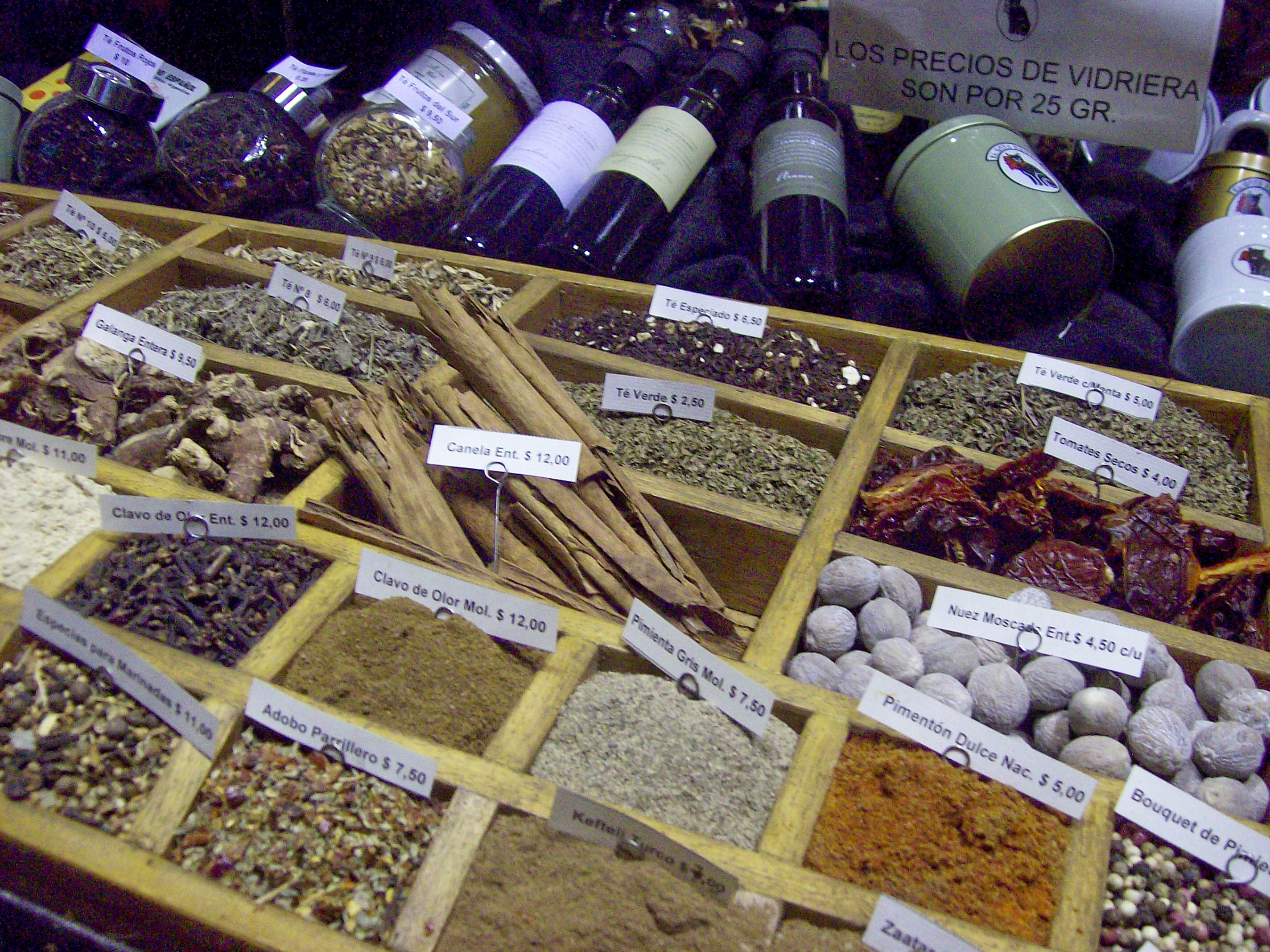 El gato negro (Corrientes 1669, barrio San Nicolás, Buenos Aires, Argentina) es un bar donde se puede disfrutar de gran variedad de estilos de infusioes. Es una de las especierías más antigua de la ciudad de Buenos Aires (creada en 1927). Tiene un amplio salón en el primer piso. También hay shows de tango, jazz y música melódica.